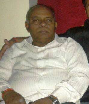 జనువాడ రామస్వామి